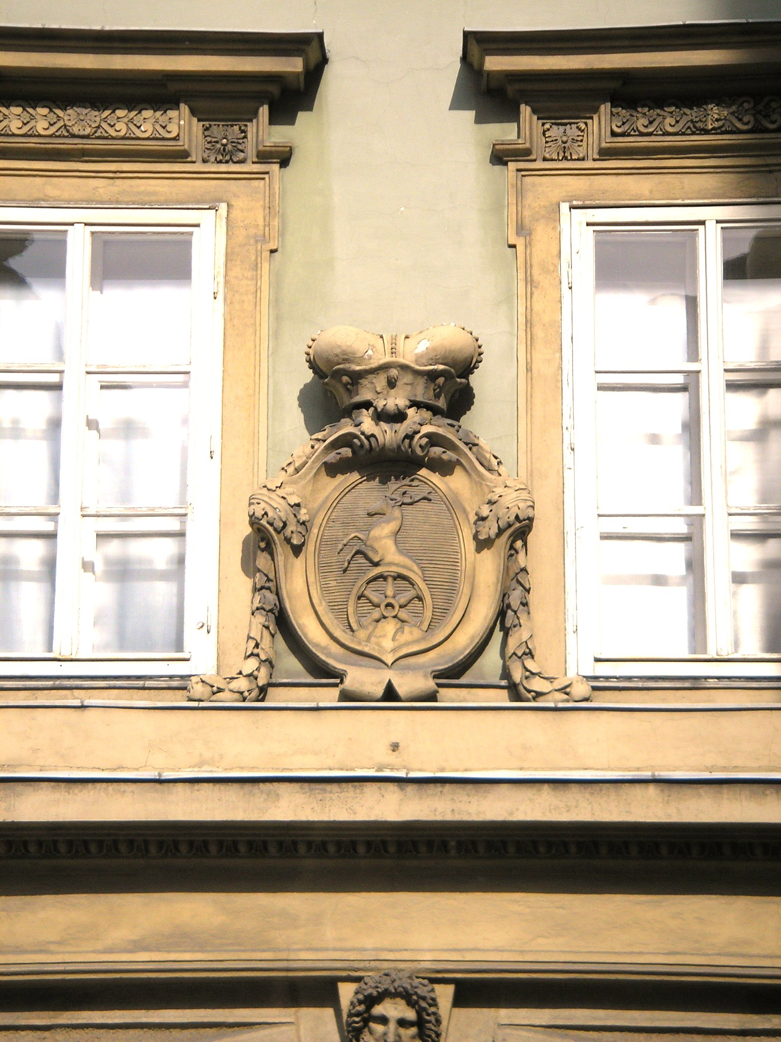 Palais Pálffy in Vienna, Josefplatz square.